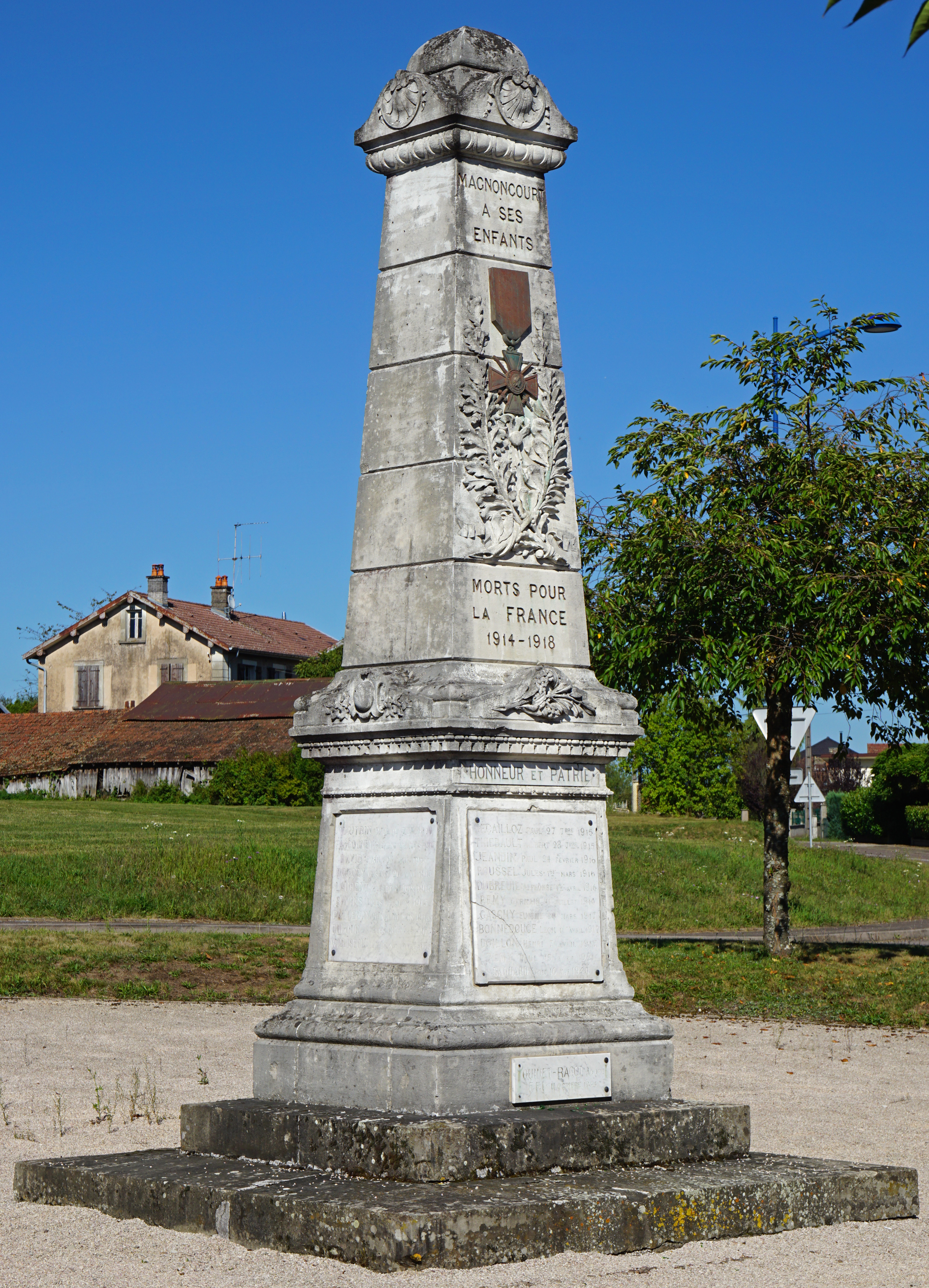 Le monument aux morts de Magnoncourt.